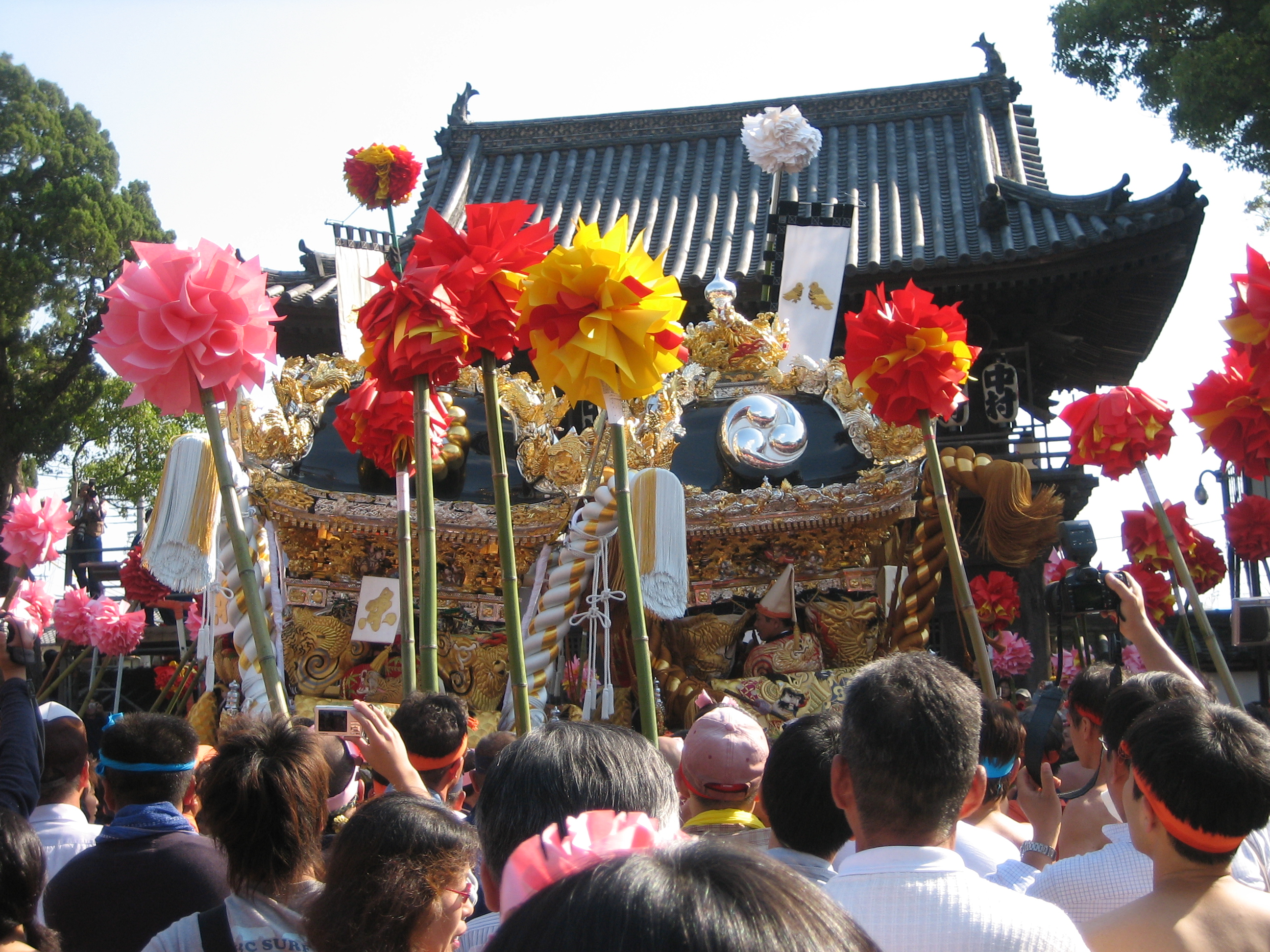 松原八幡神社境内内で練り合わせを行う旧 東山村と旧 八家村の屋台。